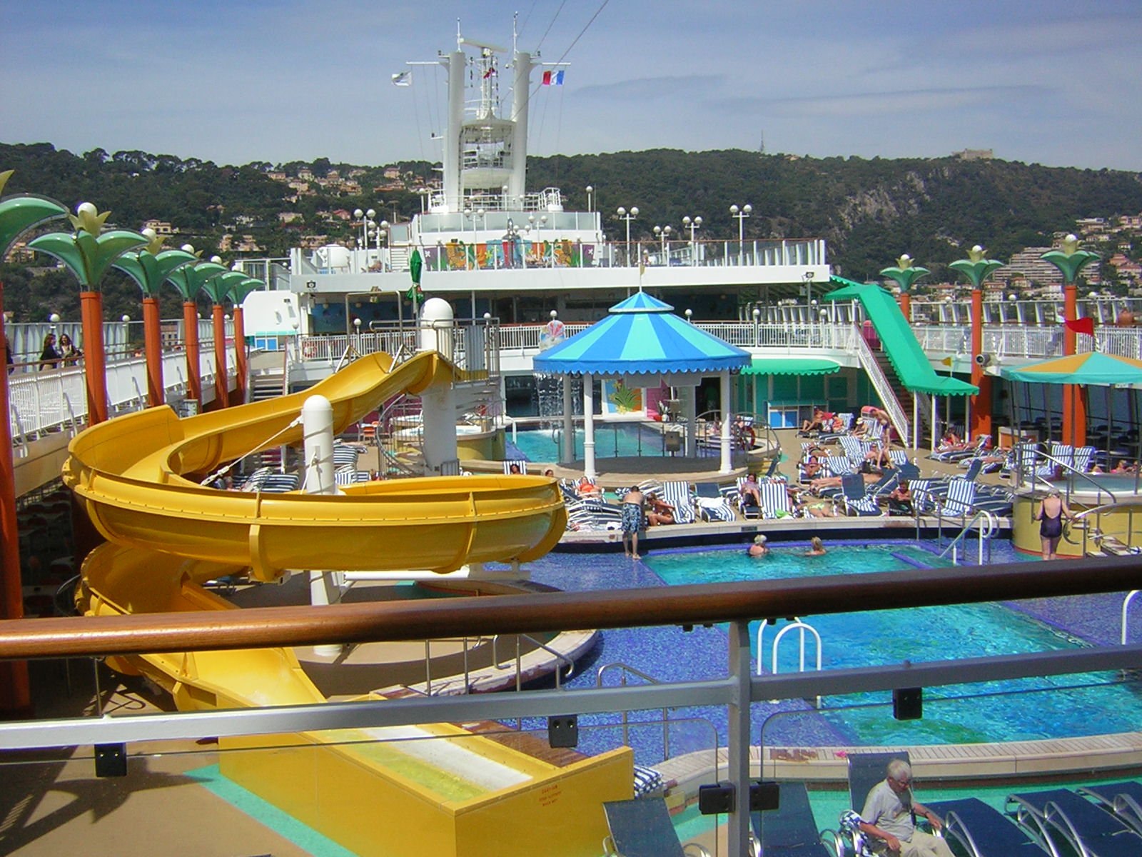 Zona de piscinas en el Norwegian Jewel.